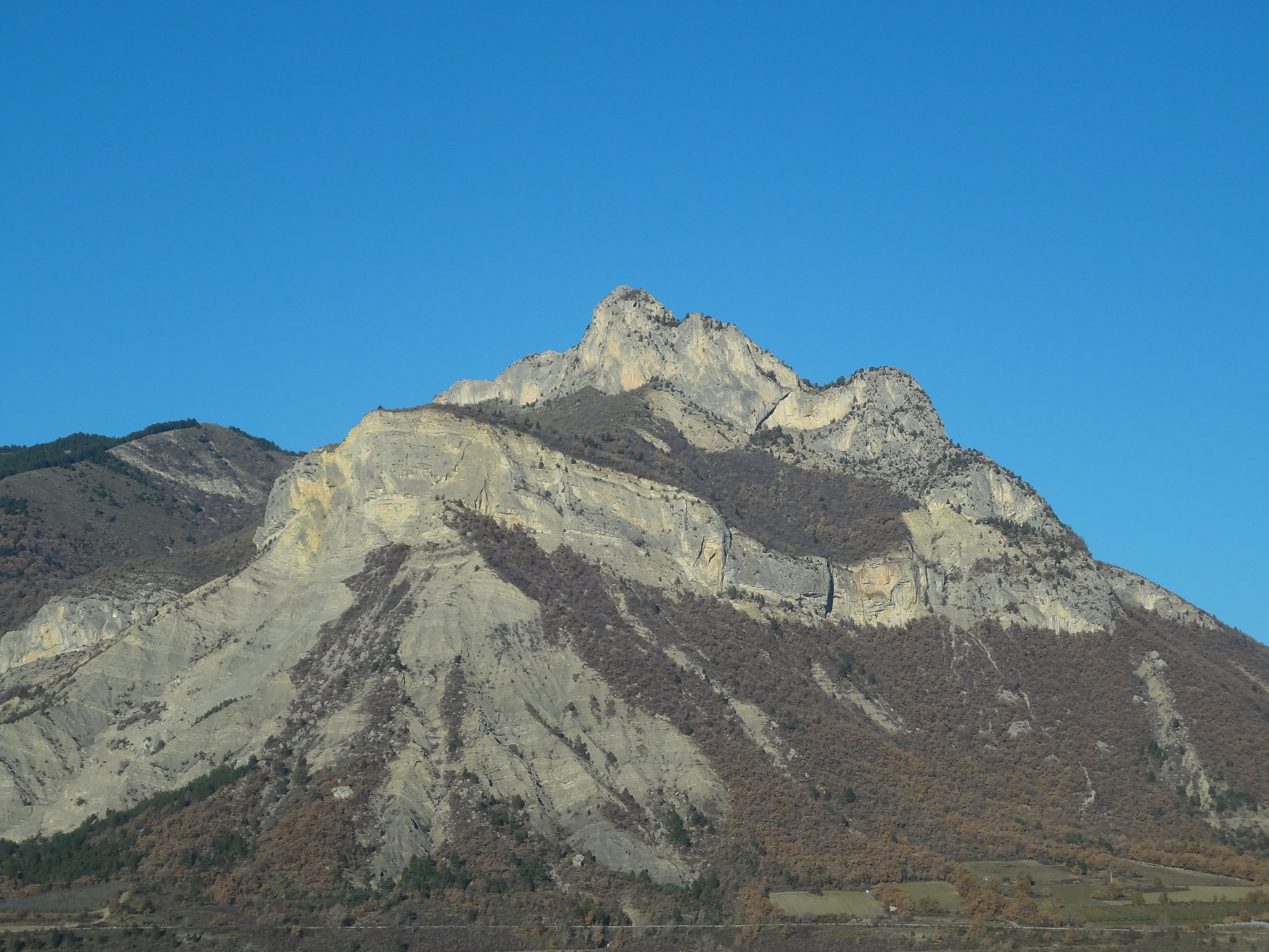 Pic de Crigne : 1263 m